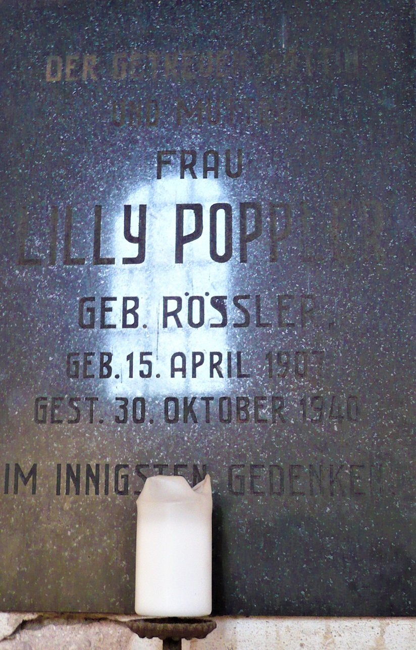 Zamek w Sarnach